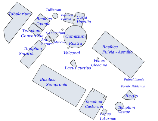 Mapa dels edificis del fòrum romà en l'època republicana.